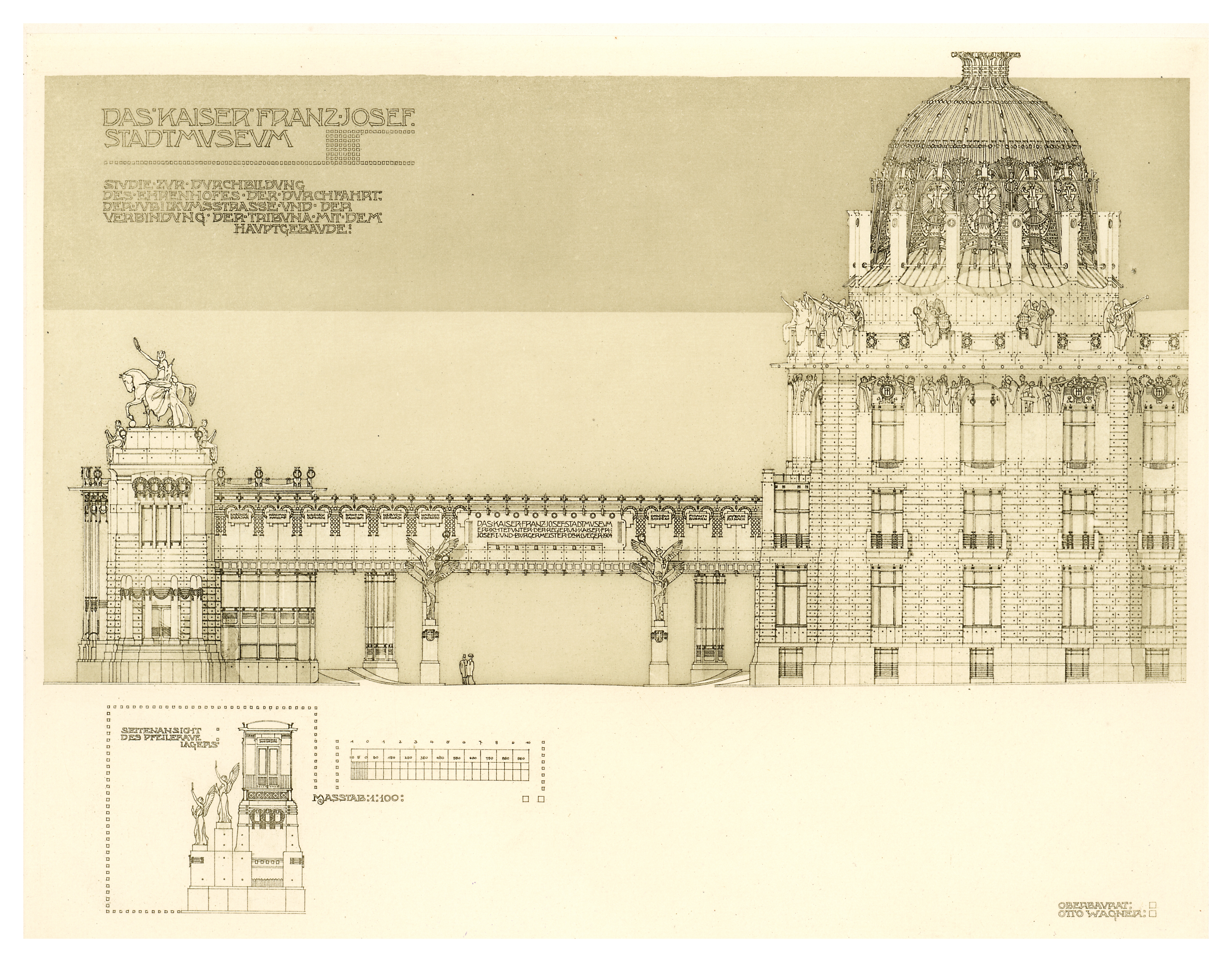 Studie Stadtmuseum Karlsplatz, Wien Bd. III Heft 5, 6, 7 Concept, not realized